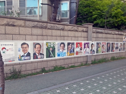 2017년 대통령선거 선거벽보